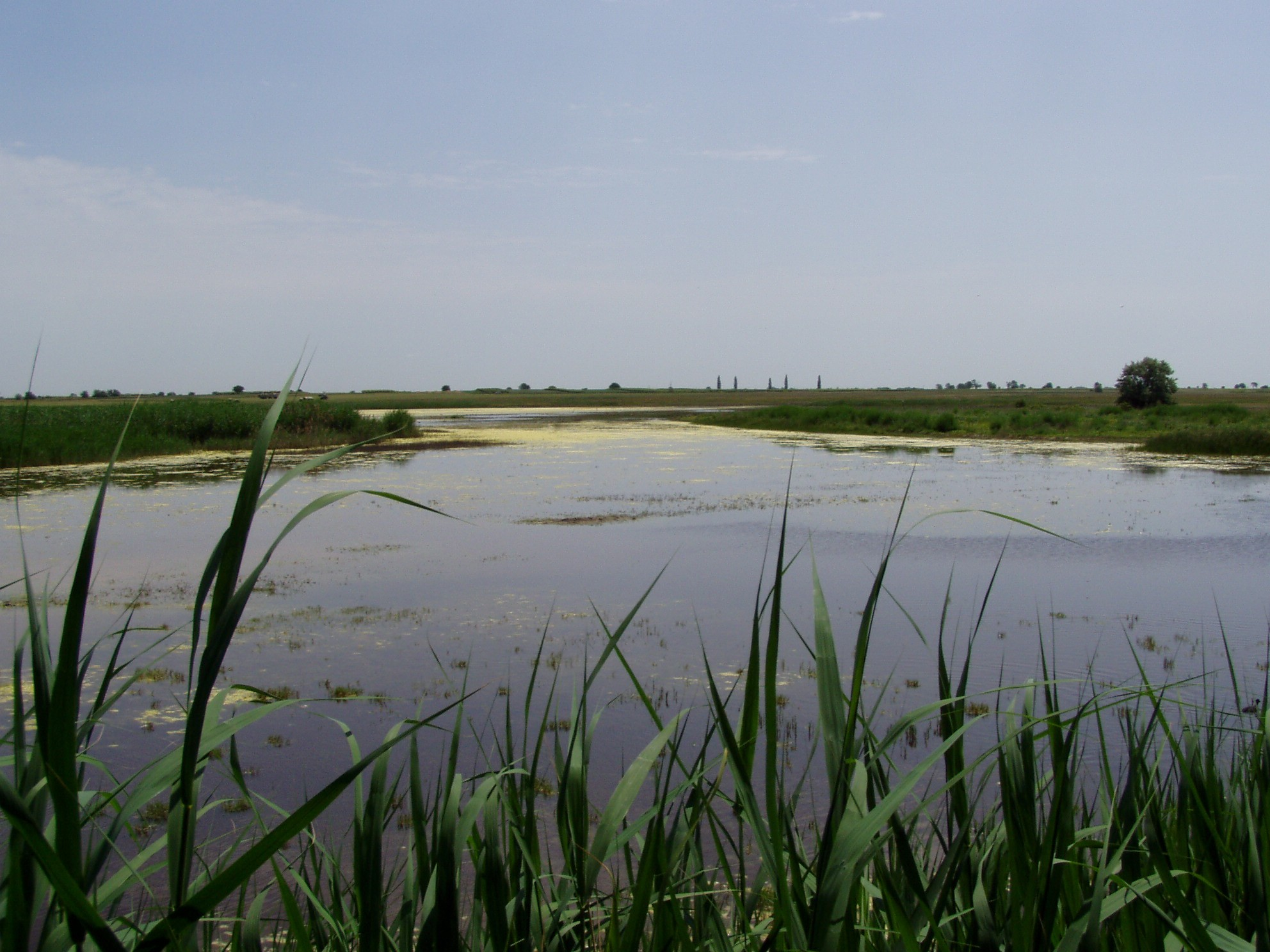 Flooded Meadows at the "Hölle", Seewinkel, Burgenland, Austria// Überflutete Hochgstetten-Wiesen im Nationalpark Neusiedler See, "Hölle" im Seewinkel, Burgenland